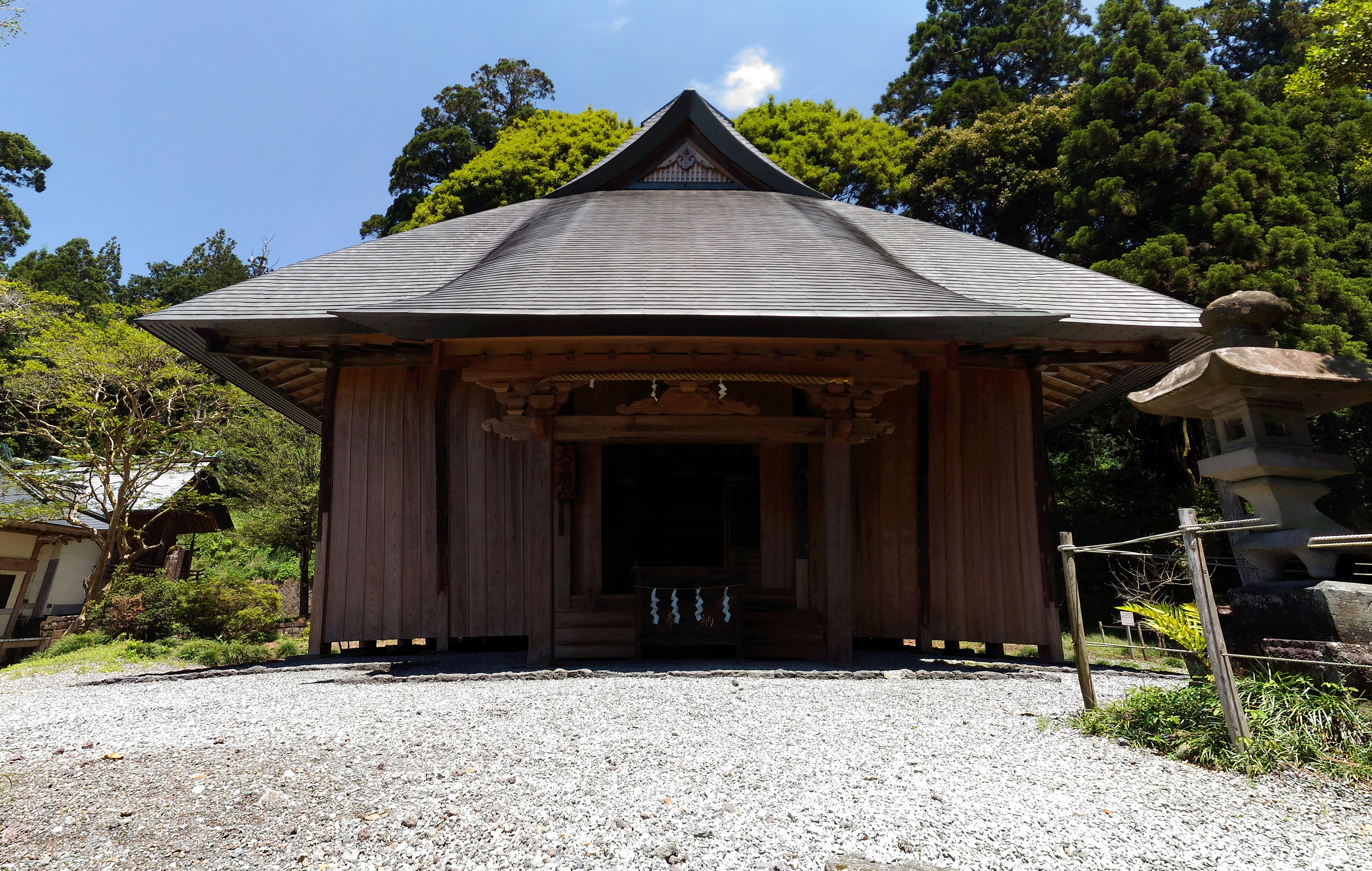 村山浅間神社の大日堂